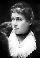 Maria Antonietta Torriani, más conocida por su pseudónimo literario, Marchesa Colombi